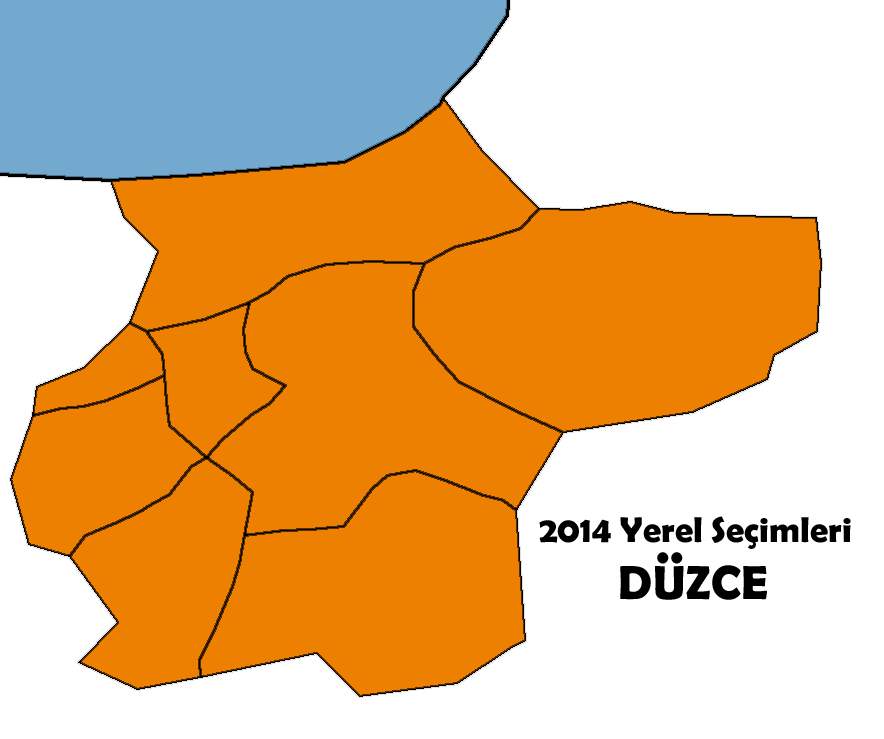 2014 Türkiye yerel seçimleri